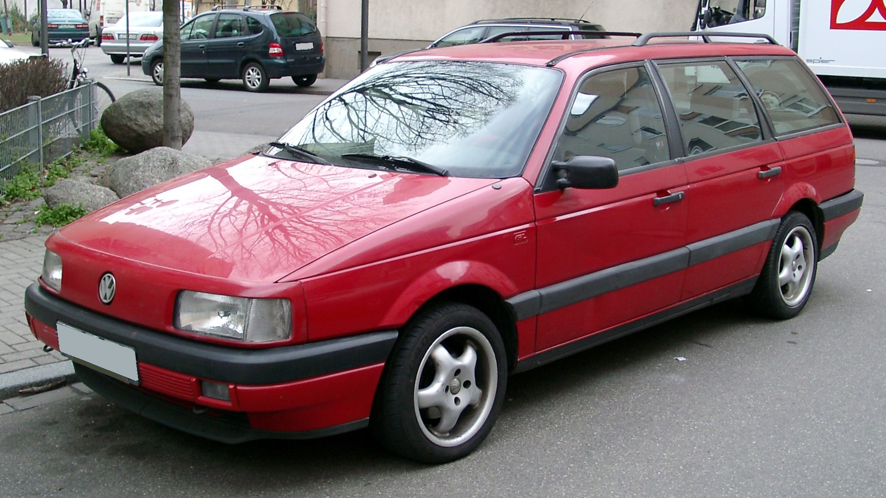 VW Passat B3 Variant